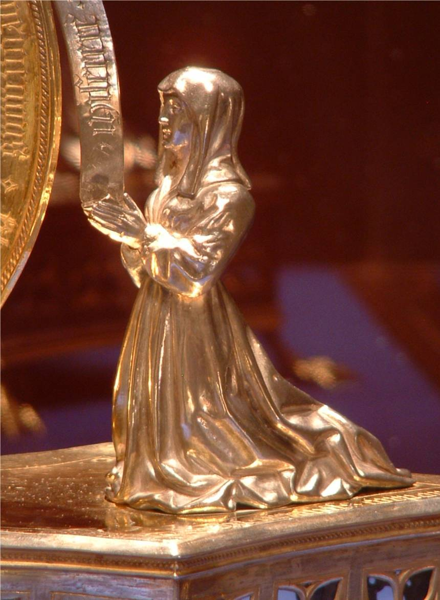 Carlotta di Savoia (1440-1483). Foto Guy Debognies 28 juni 2005